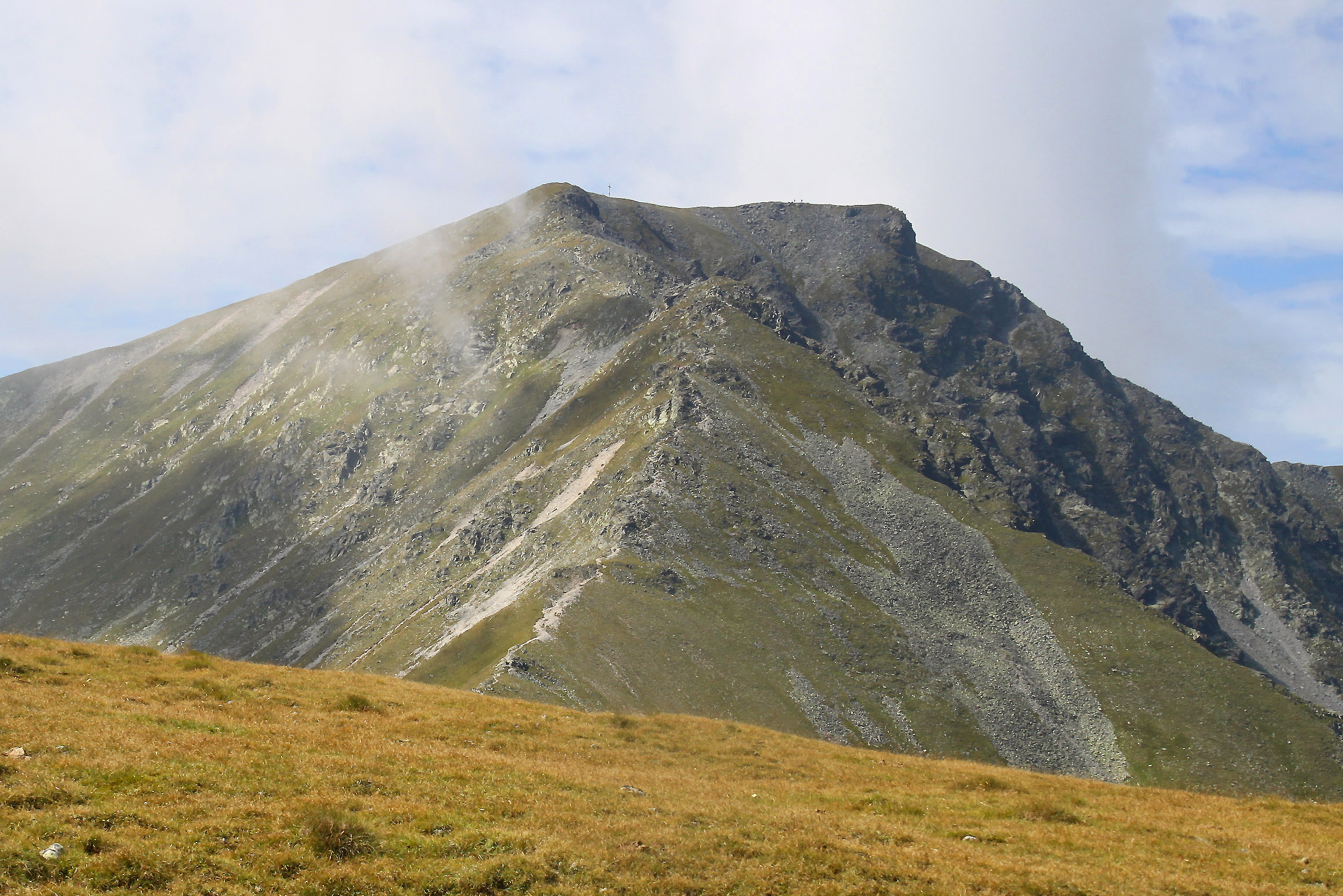 Seckauer Zinken von Nordosten